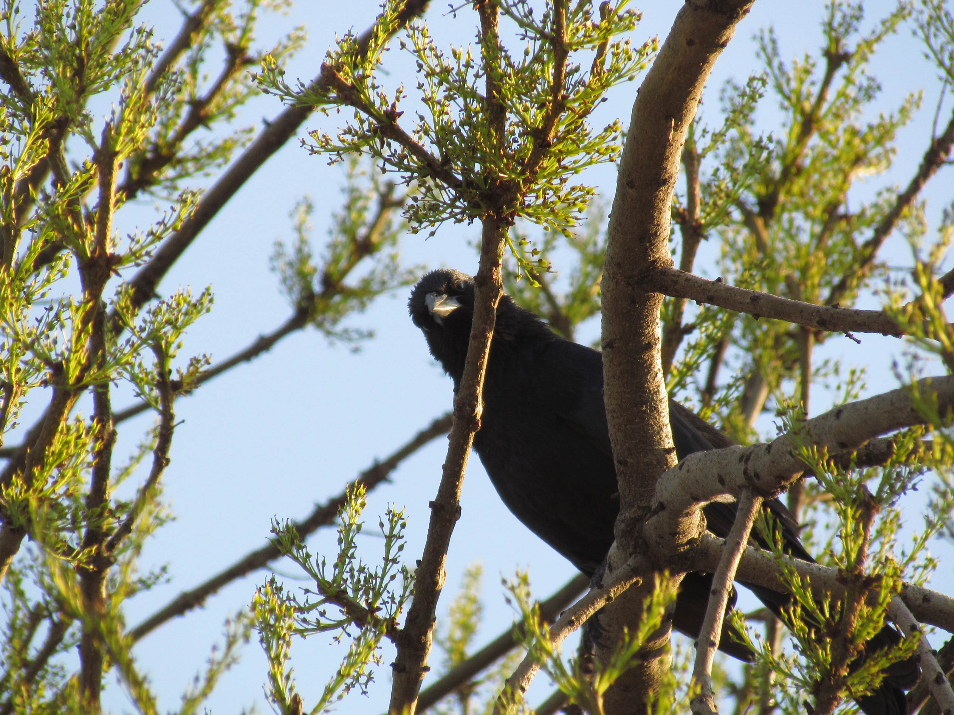 Santiago, plumifero en Los Dominicos